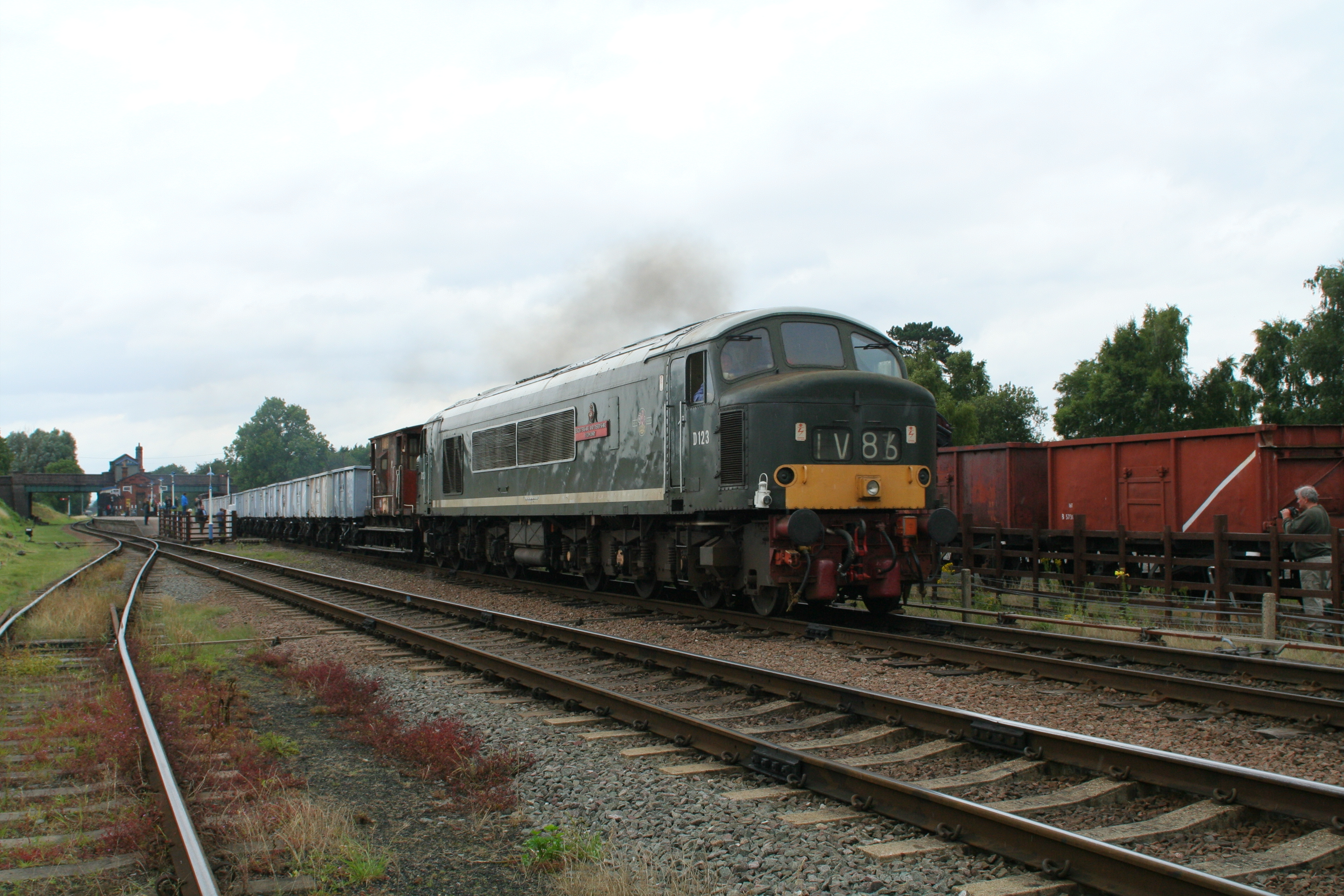 D123+windcutters